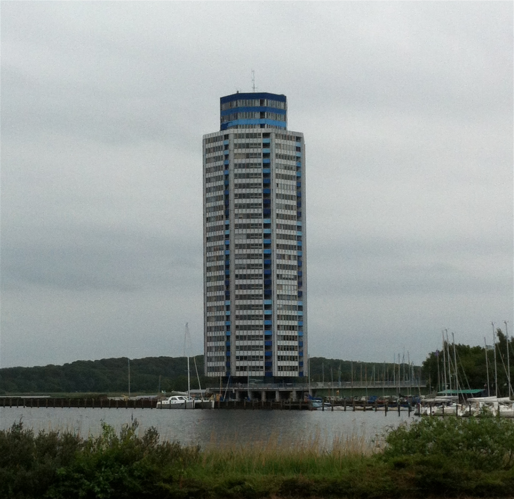 Schleswig - Wiking-Turm - Sicht von Norden